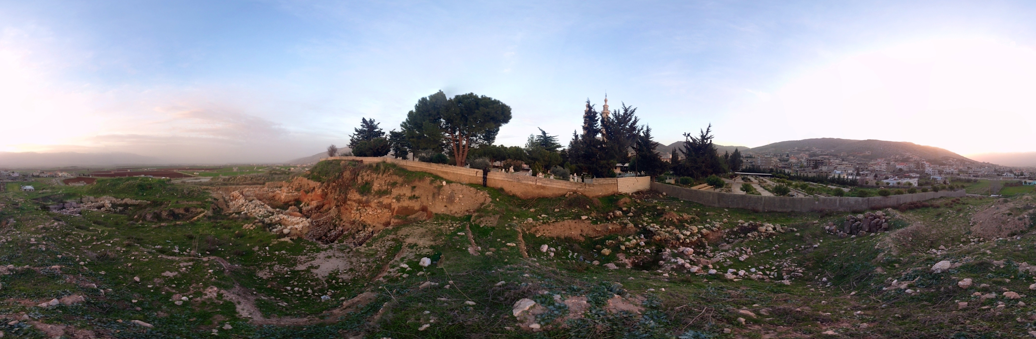 Grabungshügel Kamed El-Laouz